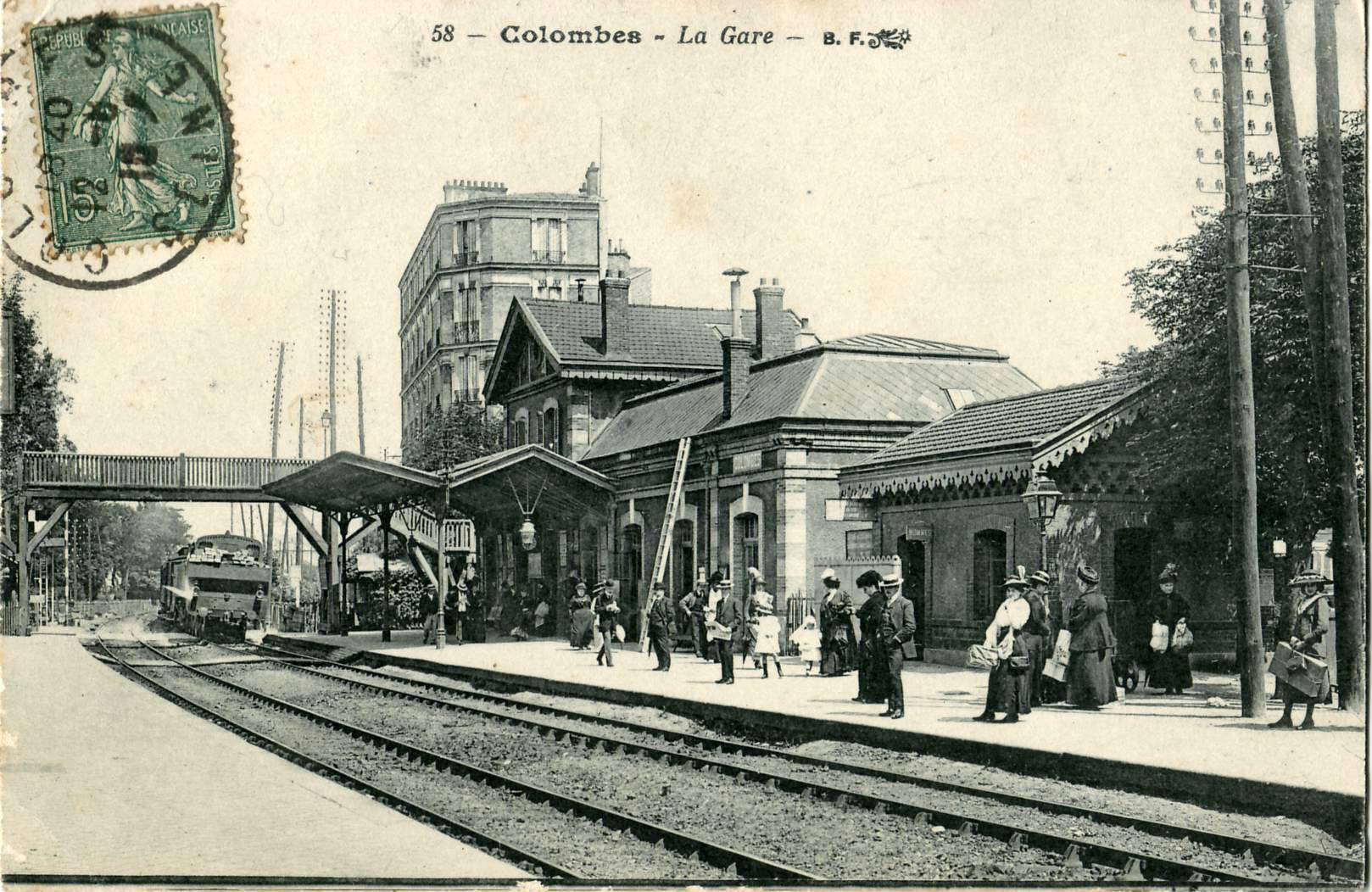 Carte postale ancienne éditée par BF à Paris, n°58 : COLOMBES - La Gare